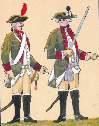 25. Regiment dragonów Buławy Polnej Koronnej [Dragon i i oficer regimentu dragonii Buławy Polnej koronnej (późniejszy 3 pułk przedniej straży)]